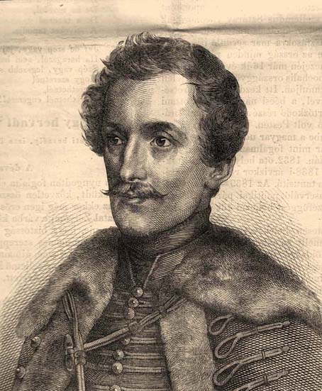 Dessewffy Aurél gróf politikus, publicista, az MTA tagja